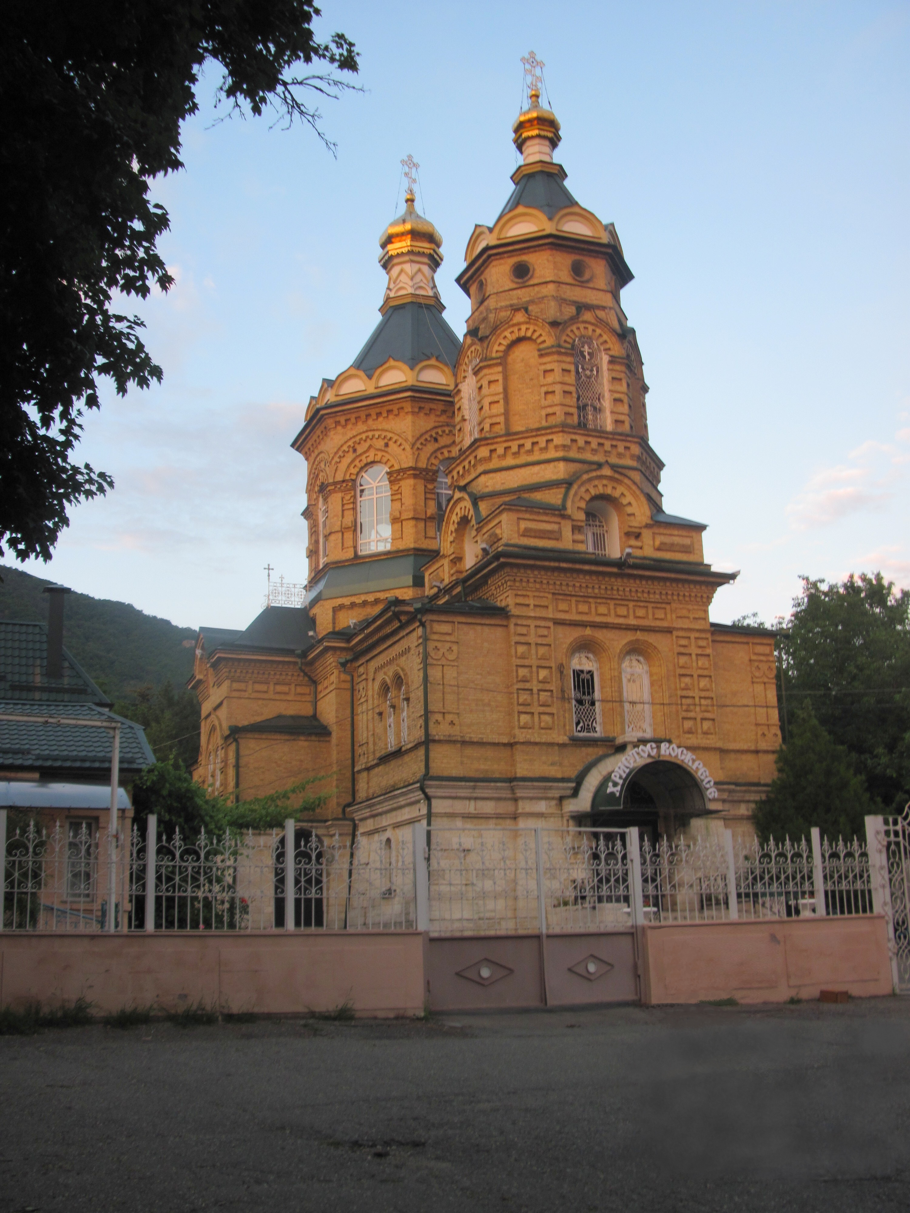 Лазаревская кладбищенская церковь в Пятигорске